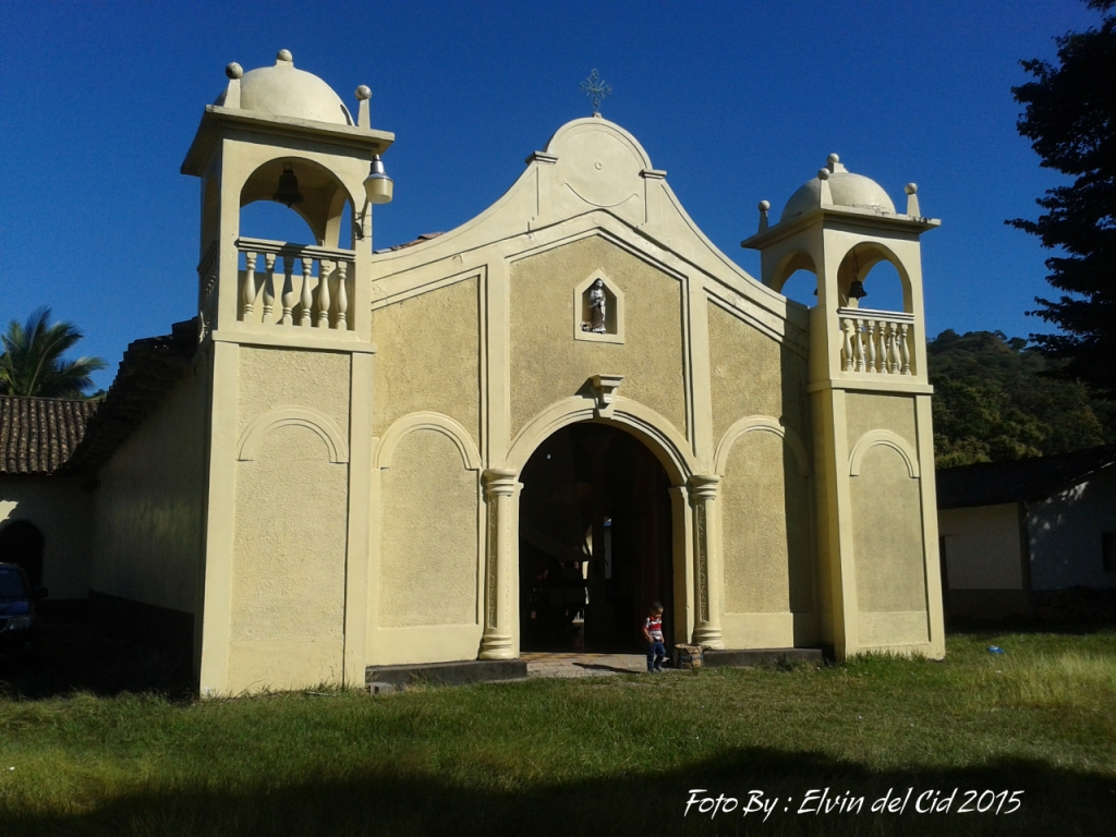 Jiquinlaca Concepcion Intibuca